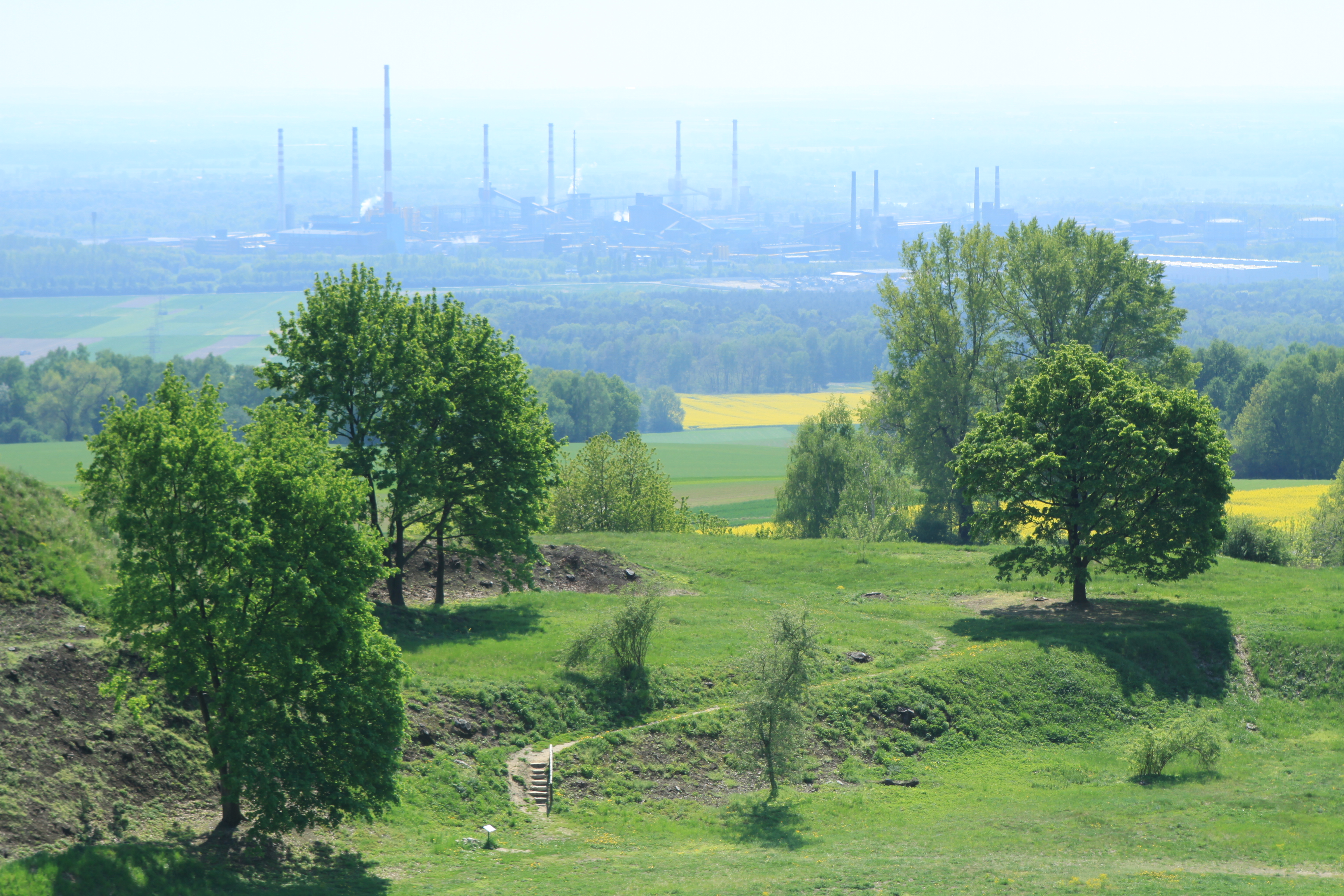 Gmina Leśnica, Poland